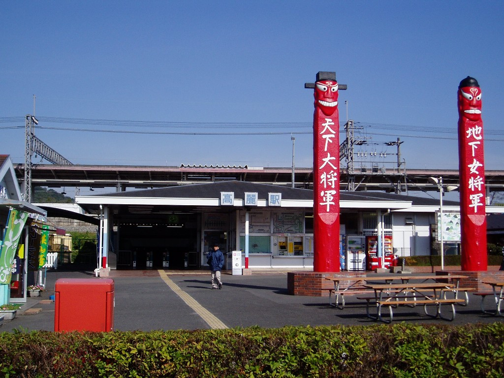 高麗駅（2006年11月撮影）